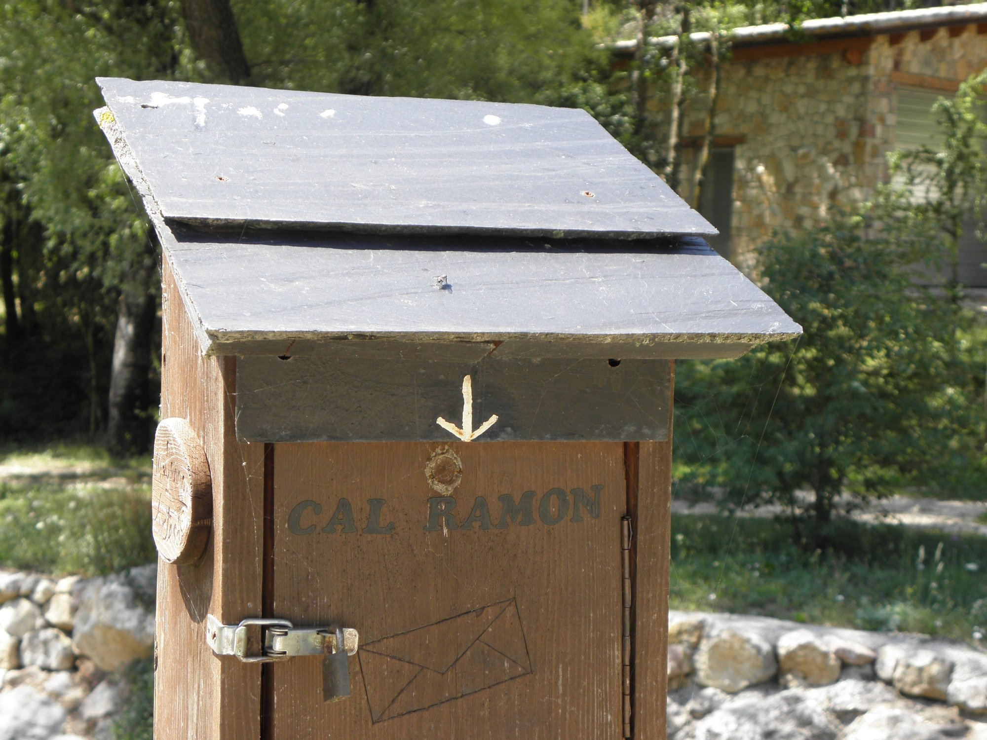 La bústia de la masia de Cal Ramon Gansola, al poble de la Com (municipi de la Coma i la Pedra), a la Vall de Lord (Solsonès) on es constata la denominació "Cal Ramon"